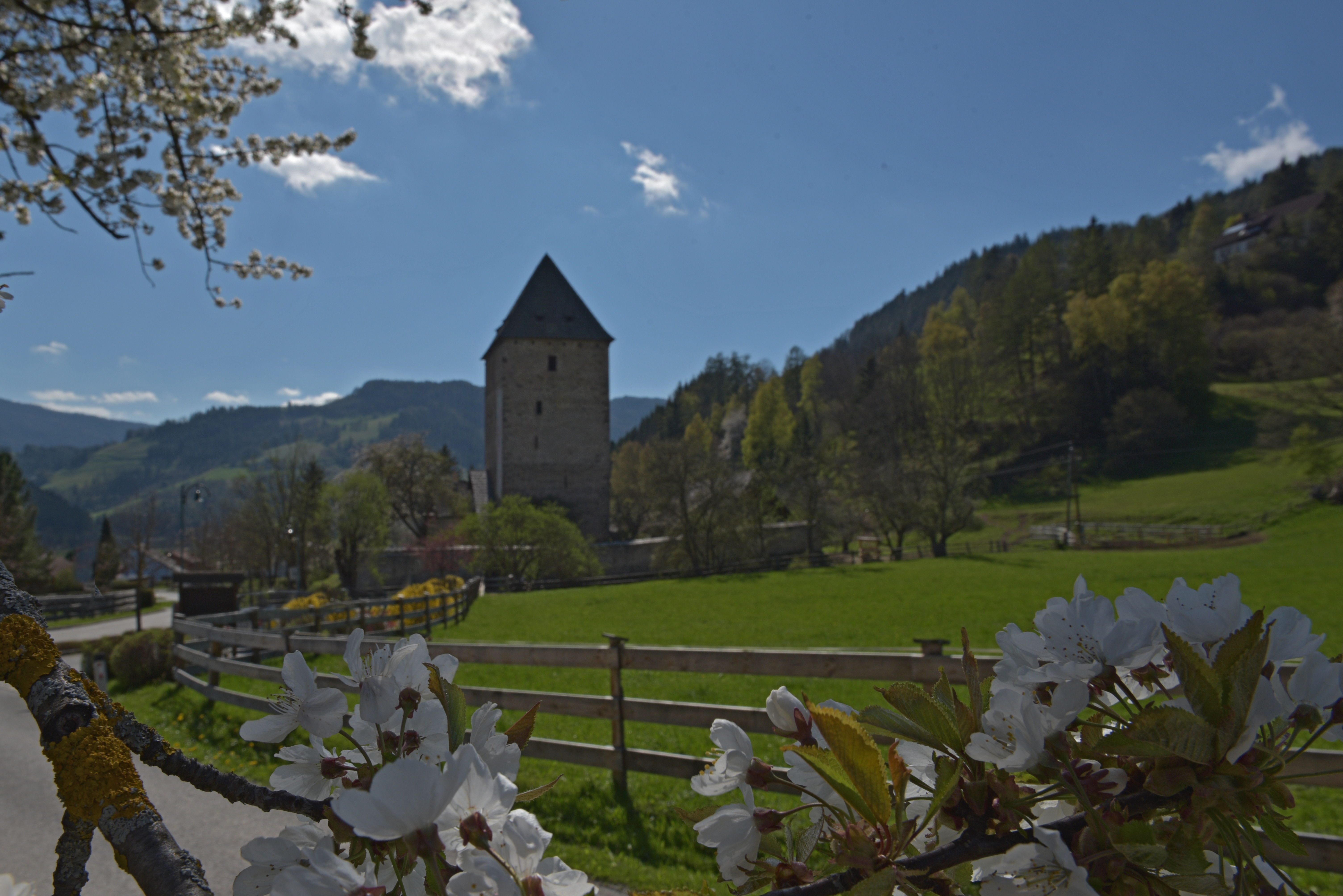 Ansicht des Wehrturmes in Baierdorf, Richtung Schöder